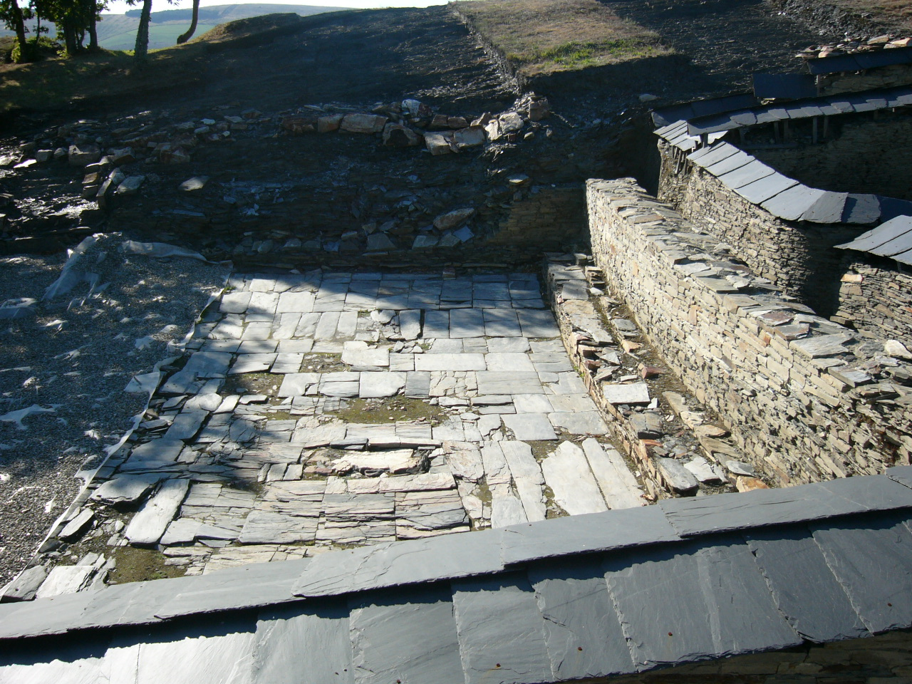 A square on Chao Samartín (Grandas de Salime - Asturies - Spain)